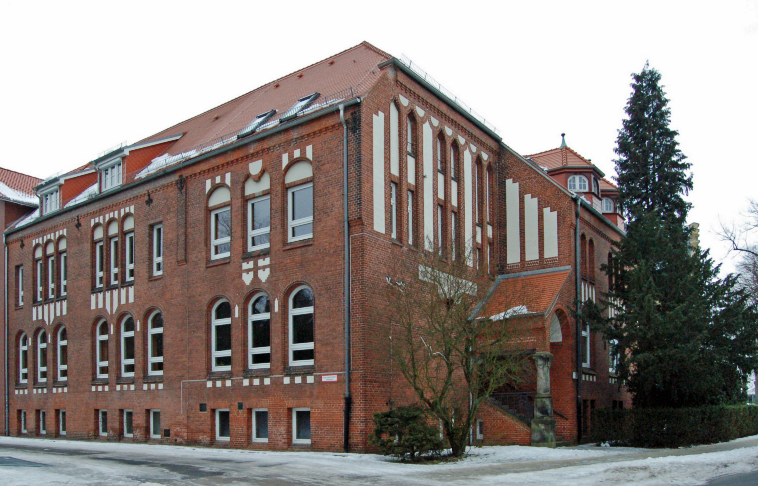 Die Präparandenanstalt in Uetersen aus dem Jahr 1904, heute gehört das Gebäude zur Ludwig-Meyn-Schule und steht unter Denkmalschutz